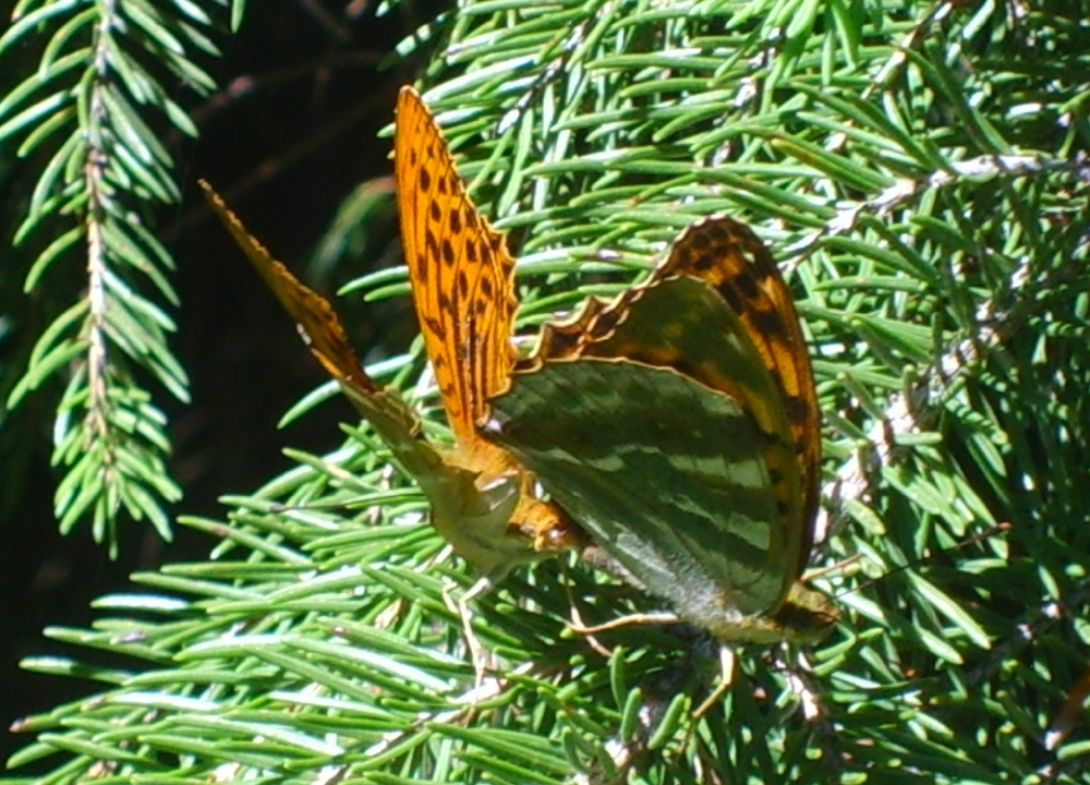 Argynnis paphia mating